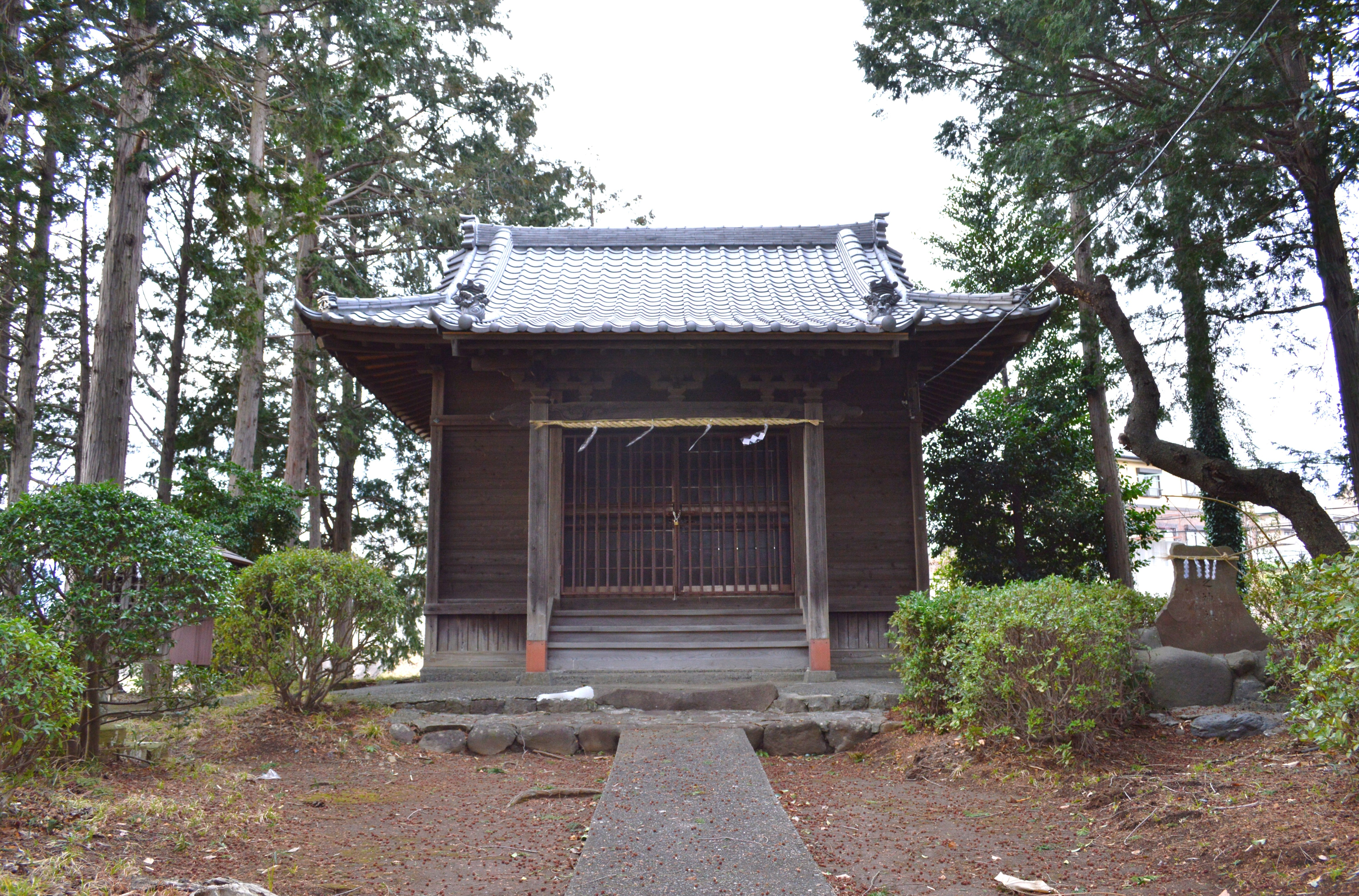 天神社 (三嶋大社元境外摂社)